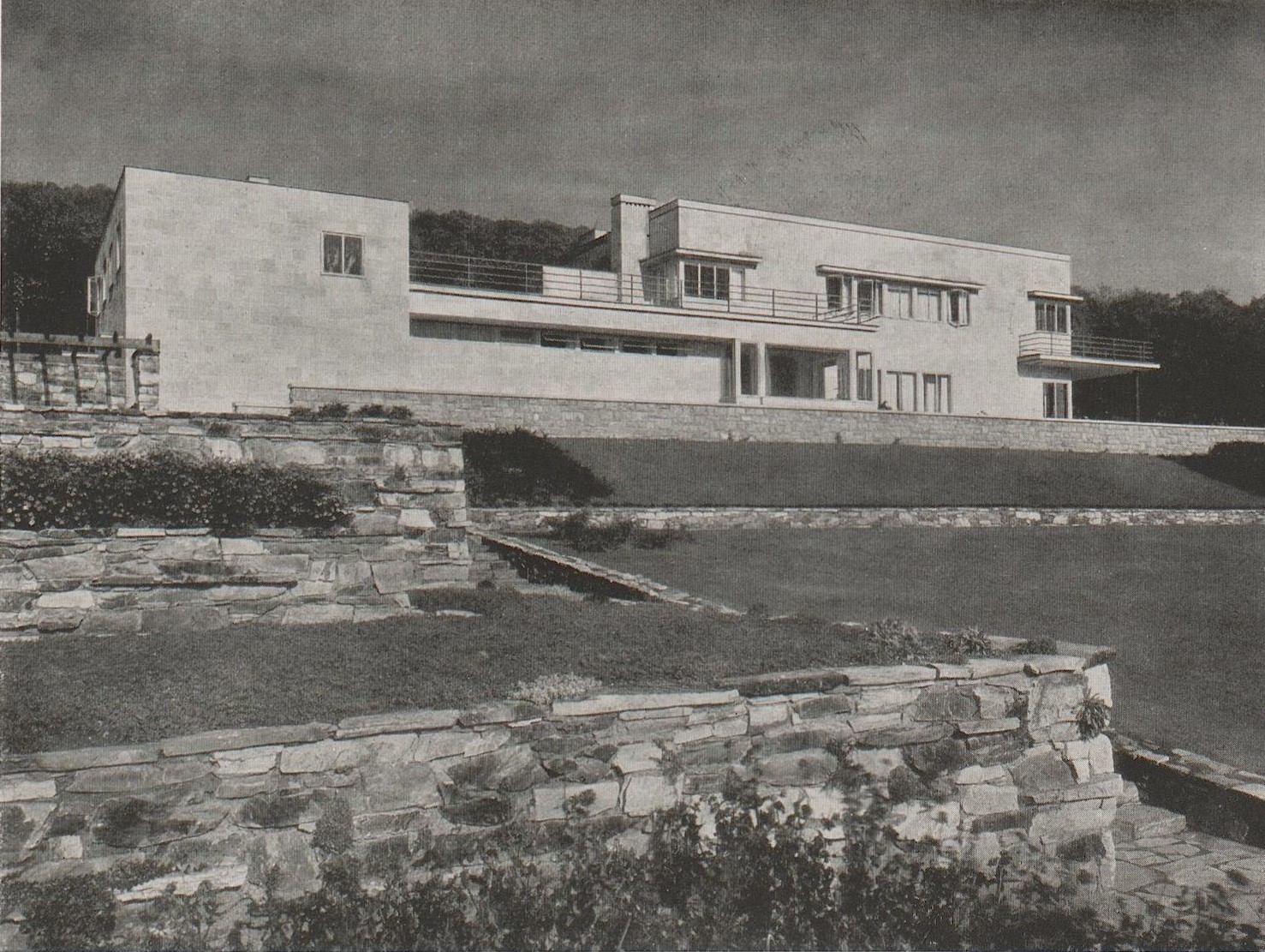 Professor Dr. Peter Behrens: Villa Gans in Kronberg. Gesamtansicht der Südseite.